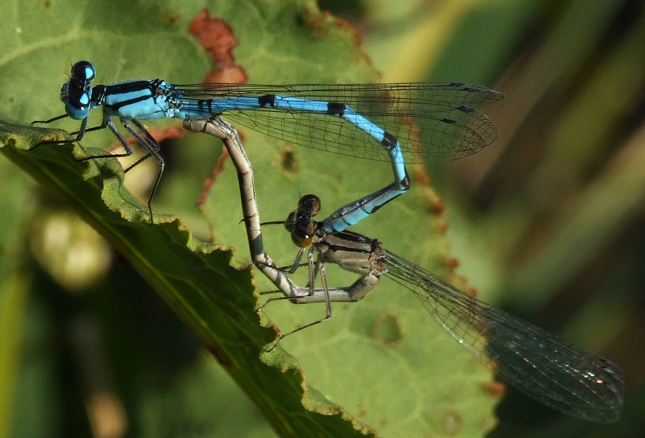 Enallagma cyathigerum tandem, Gemeine Becherjungfer bei der Paarung, NSG Kirchwerder Wiesen, Hamburg, Germany